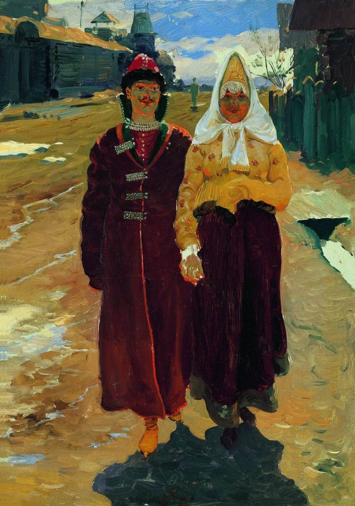 В гости. 1896. Холст, масло. Нижегородский художественный музей, Нижний Новгород